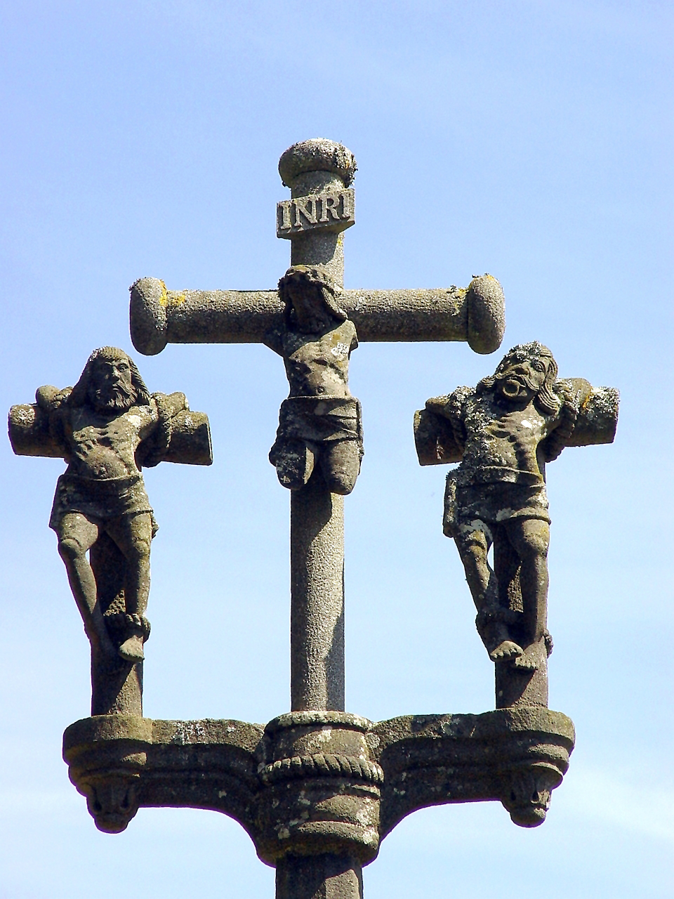 Irvillac (Bretagne, Finistère) Coatnant, Calvaire. Kruzifix und die beiden Schächer.